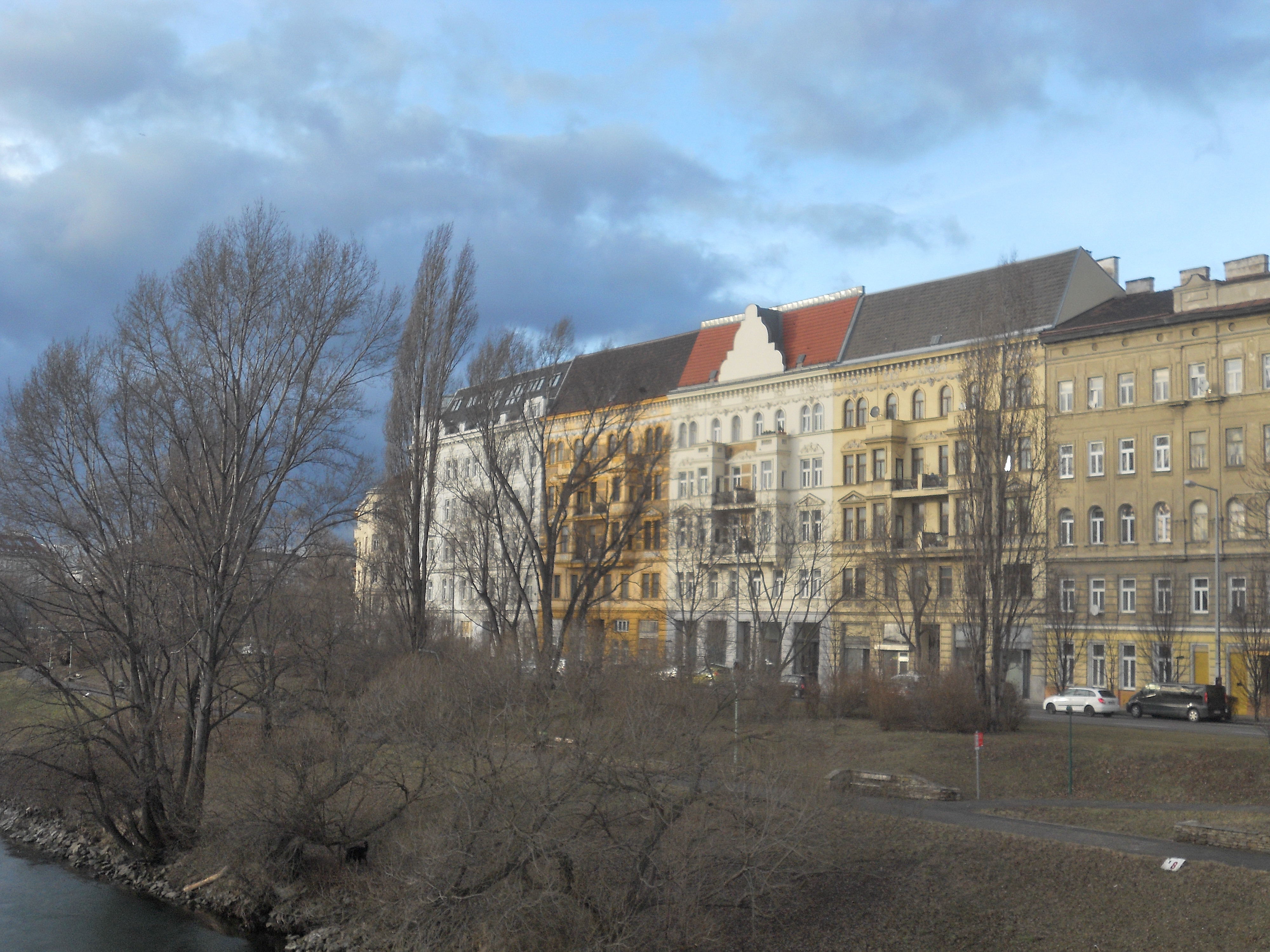 Die späthistoristische Bebauung der Schüttelstraße, vom Erdberger Steg aus gesehen. Abgebildet sind folgende Häuser (von links): Schüttelstraße 71, 73, 75, 77, 77a und 79.